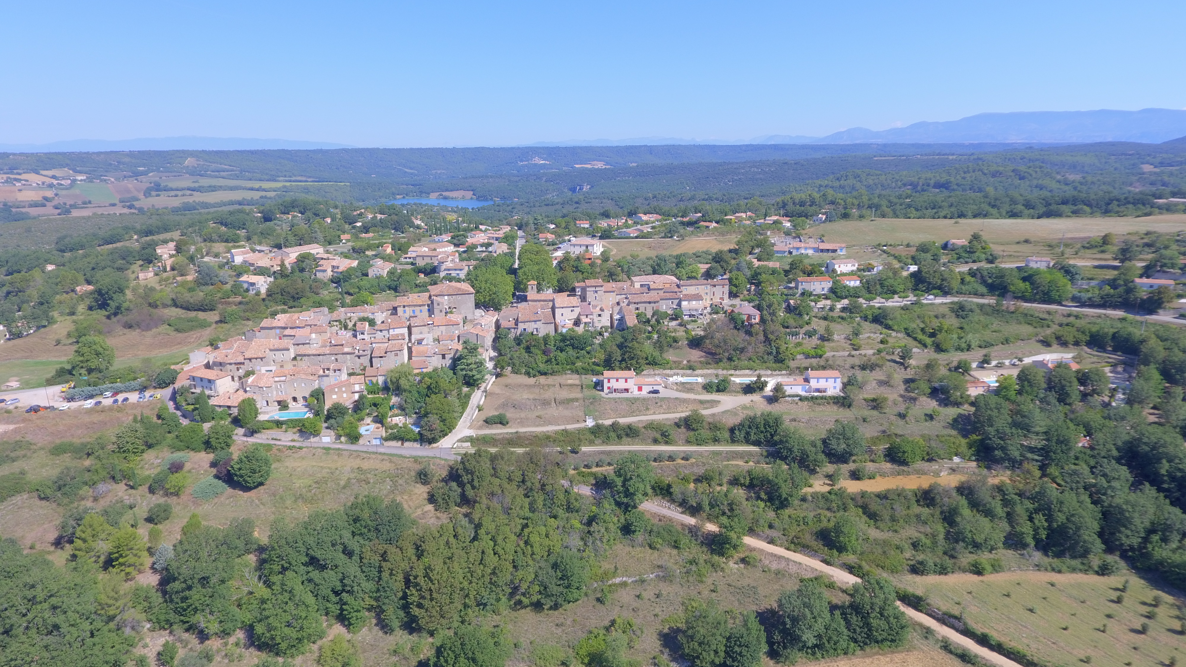 Implantation de Artignosc avec son lac et le plateau de Riez(04) en fond